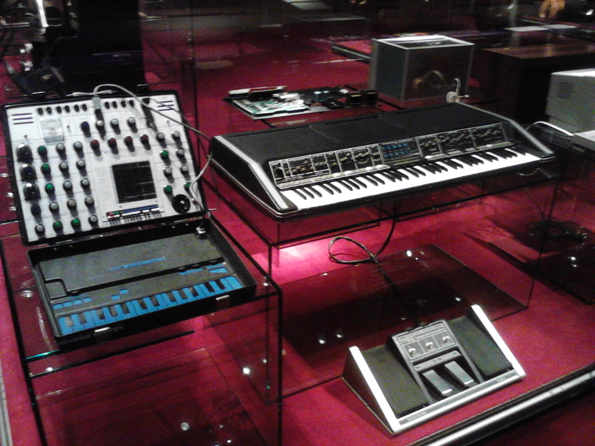 teclat i sintetitzador EMS Synthi AKS Moog Polymoog